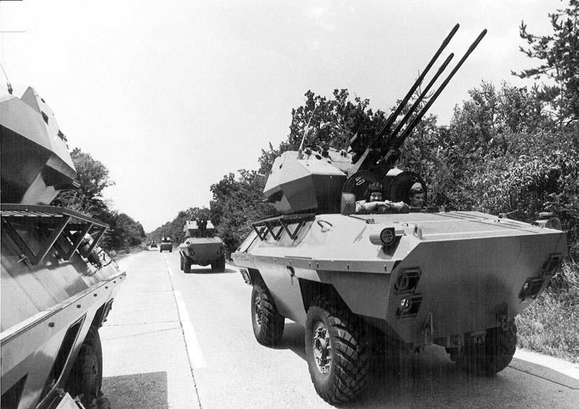 Kolona oklepnih vozil JLA v krakovskem gozdu